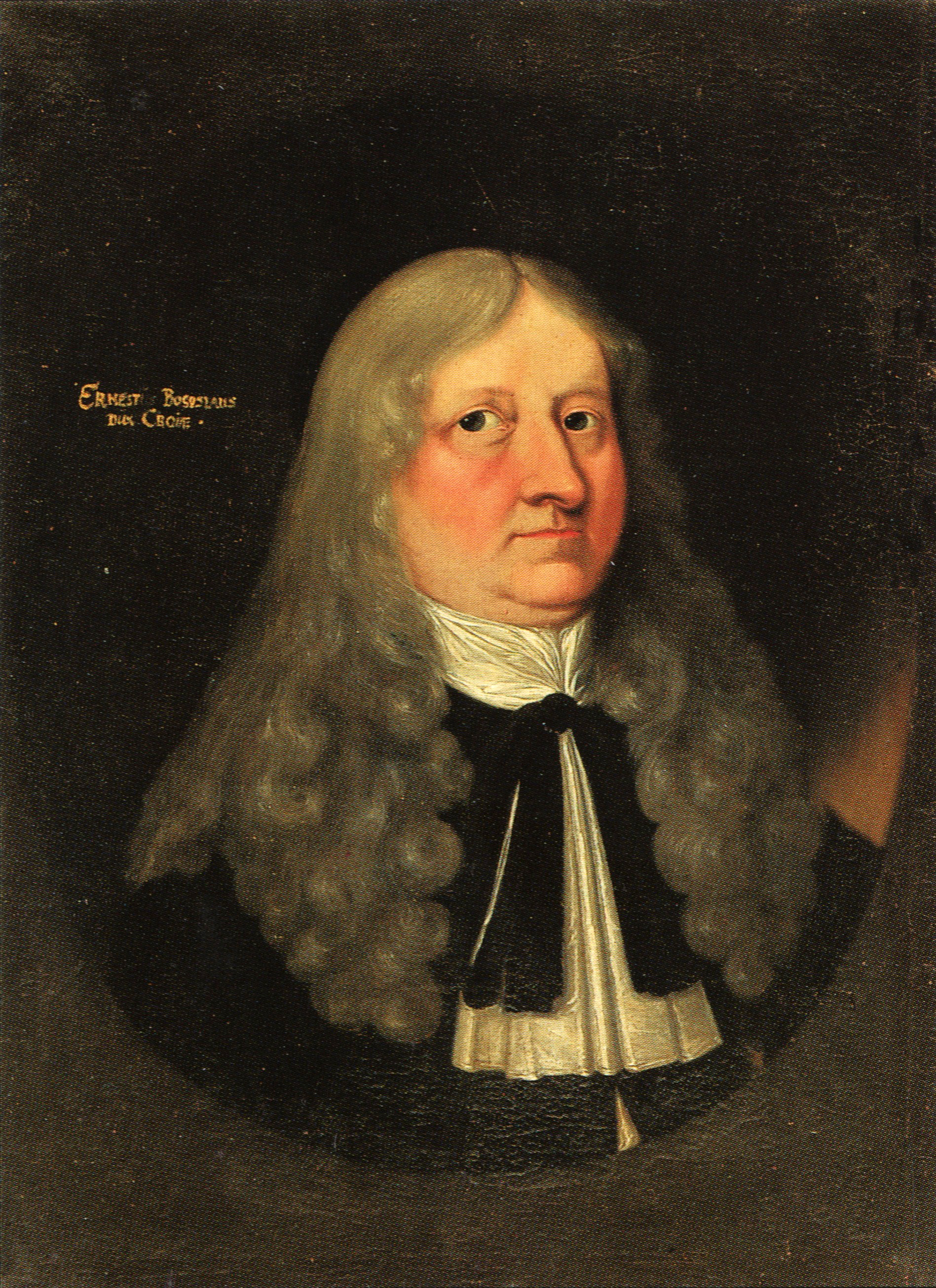 Bildnis von Ernst Bogislaw von Croy (1620–1684)